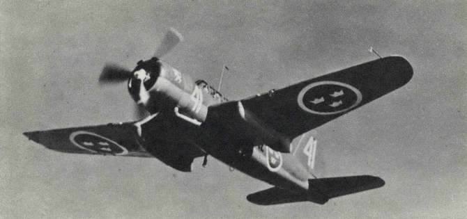 Saab B 17C som flyger